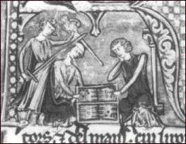 Hughes II du Puiset, Count of Jaffa